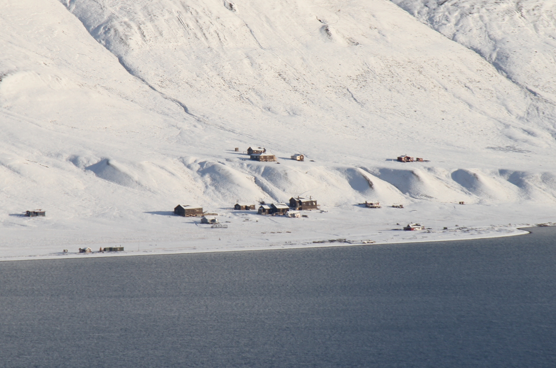 Settlement at the north shore of dvent Fjord, from ca 1900-1930. This was the first settled coalmining communities, before Longyearbyen was opened in 1906.